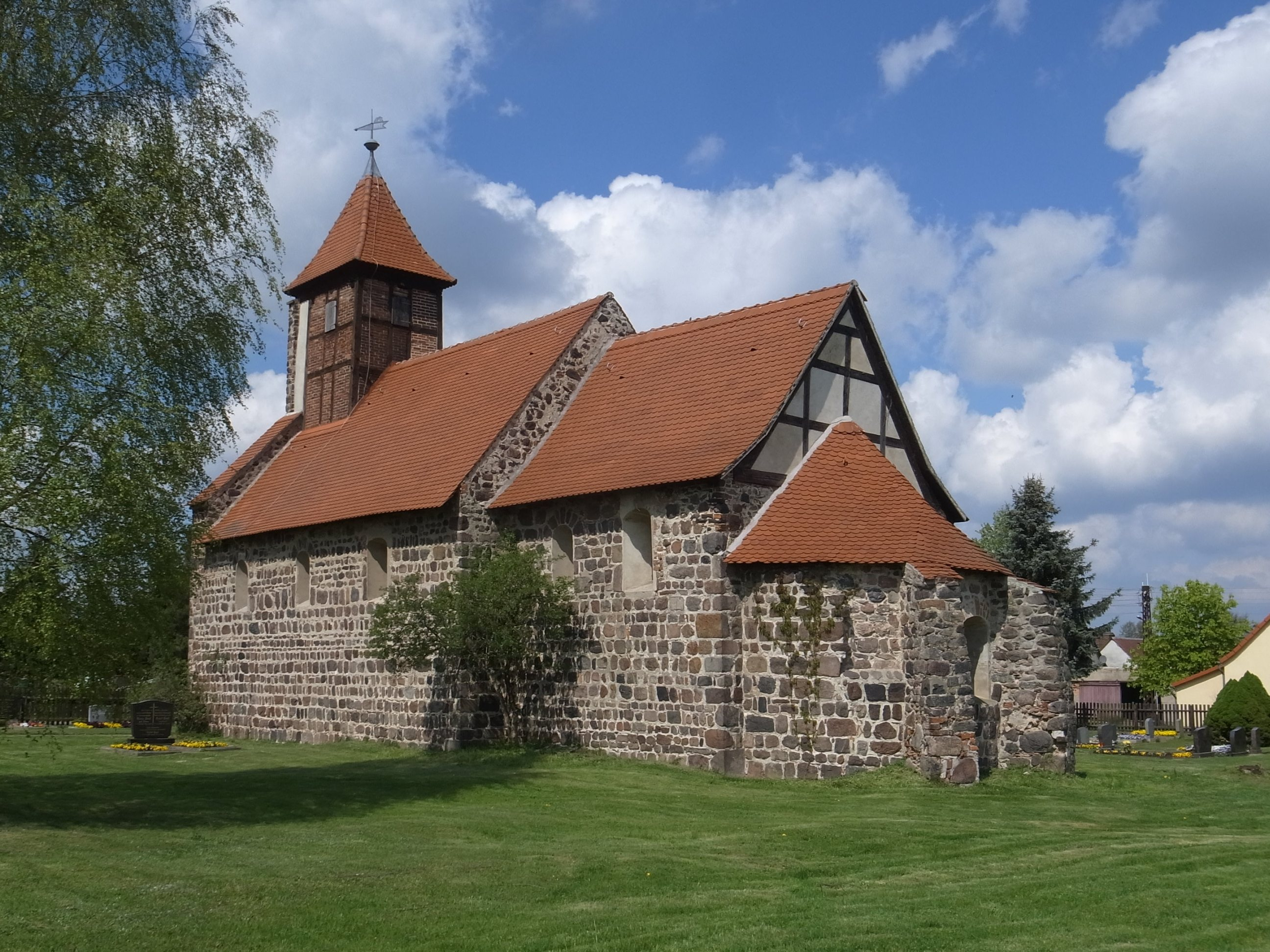 Ragösen, Thießener Weg, Kirche St Jacobi (Baudenkmal im Denkmalverzeichniss Sachsen-Anhalt, Erfassungsnummer: 094 41312 000 000 000 000 [1])